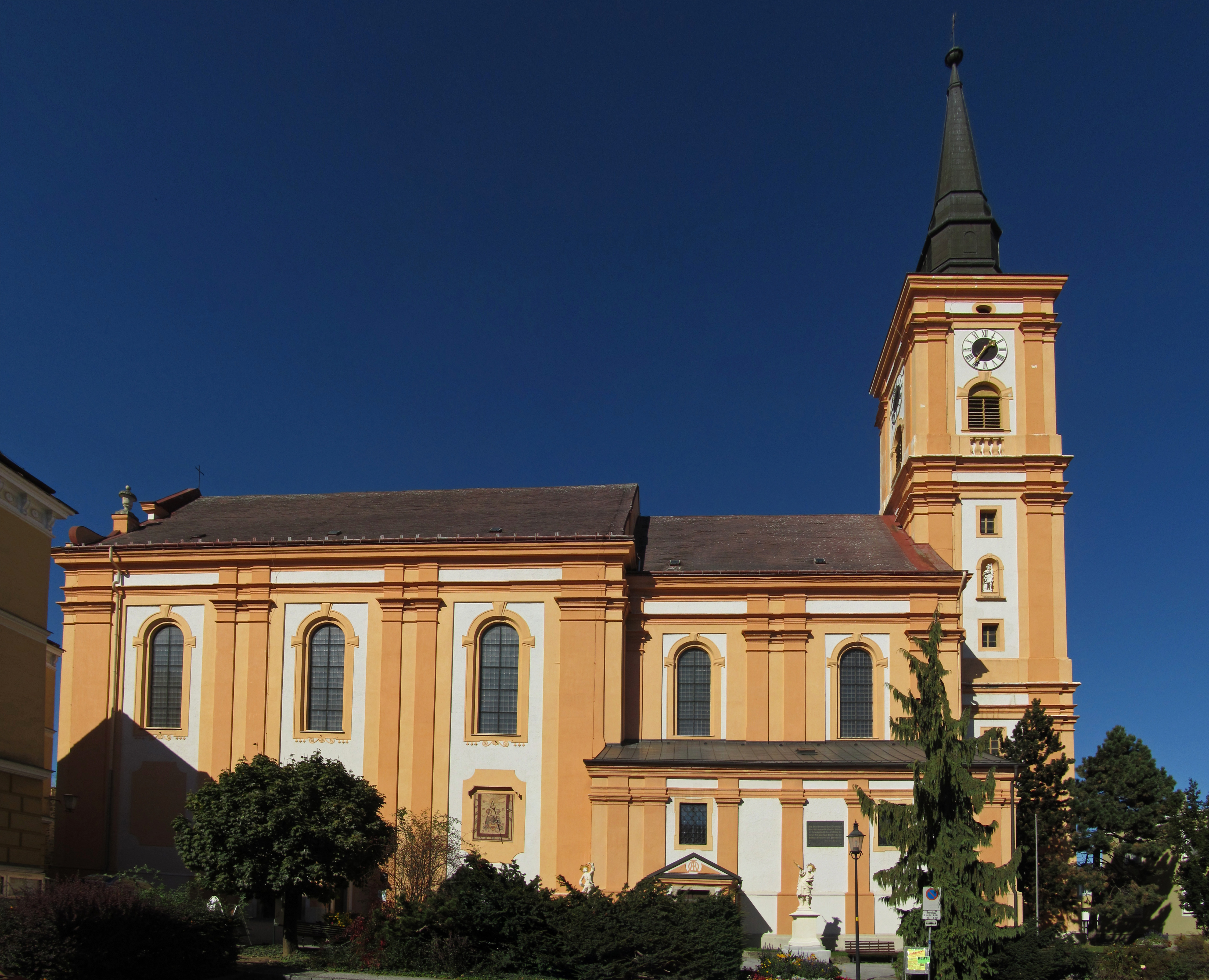 Barocke Saalkirche, erbaut im 18. Jahrhundert an Stelle eines gotischen Baus. Außenbau mit einheitlicher, schlichter Gliederung. Wandfelder durch Pilasterrücklagen mit umlaufenden Gebälken ausgebildet. Fassade gegenüber der Stadtmauer mit architraviertem Rechteckportal.